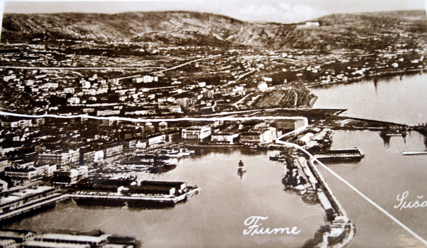 granica između Rijeke i Sušaka 1937. godine